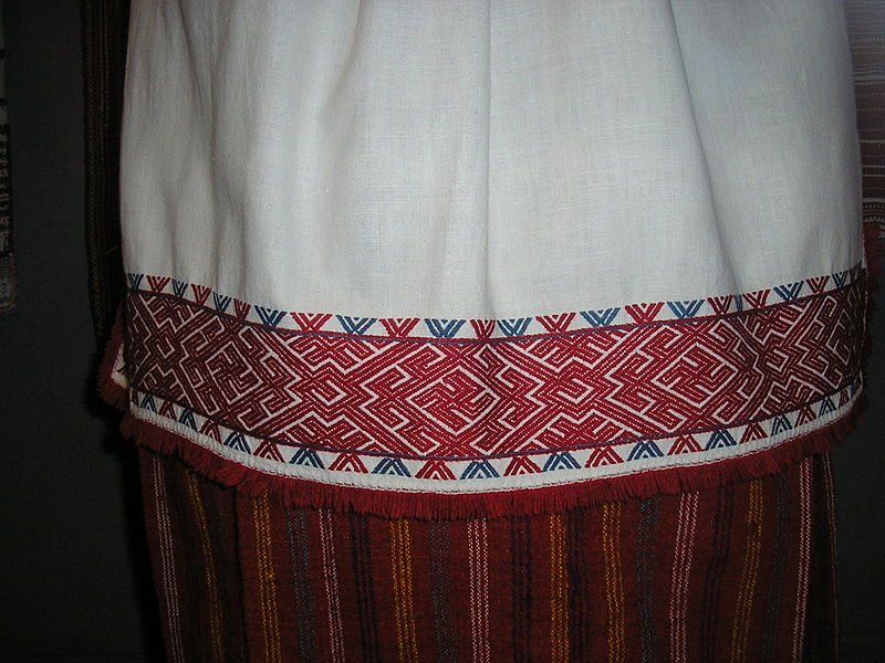 Падол Лунінецкага строю са свастычным арнаментамБеларуская (тарашкевіца): Падол Лунінецкага строю са свастычным арнамэнтам